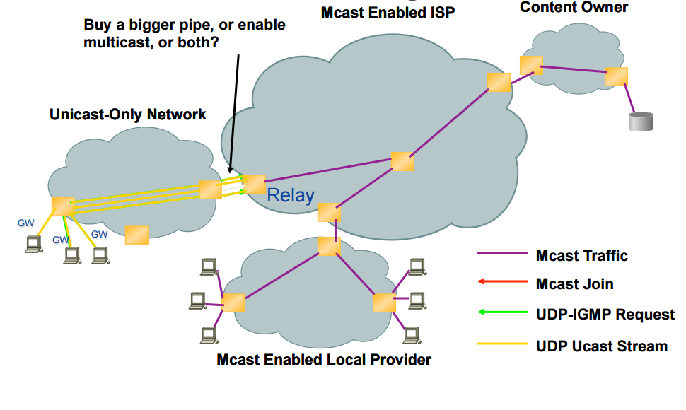 Diseño de red con AMT.